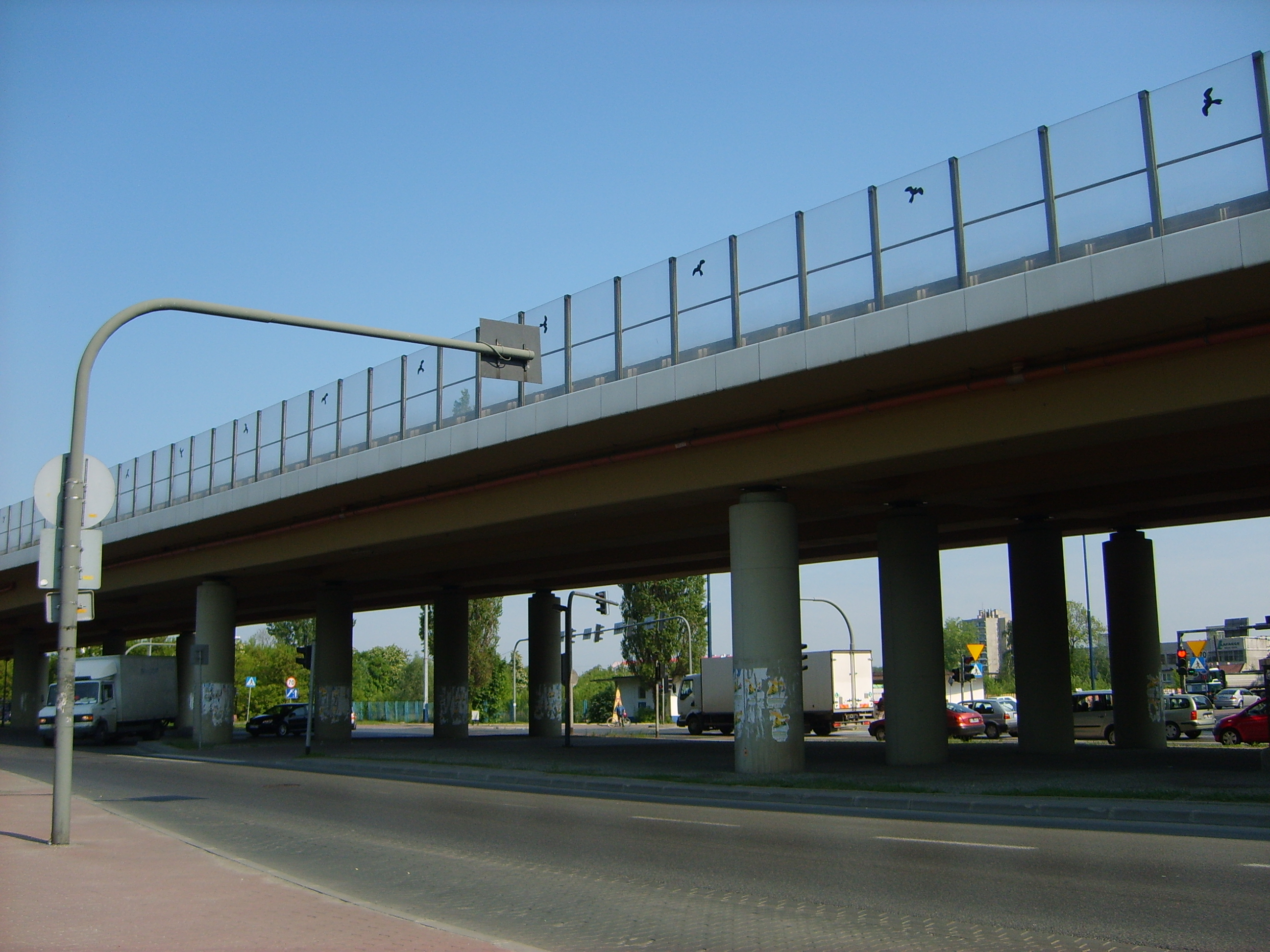 Estakada nad ul. Opolską